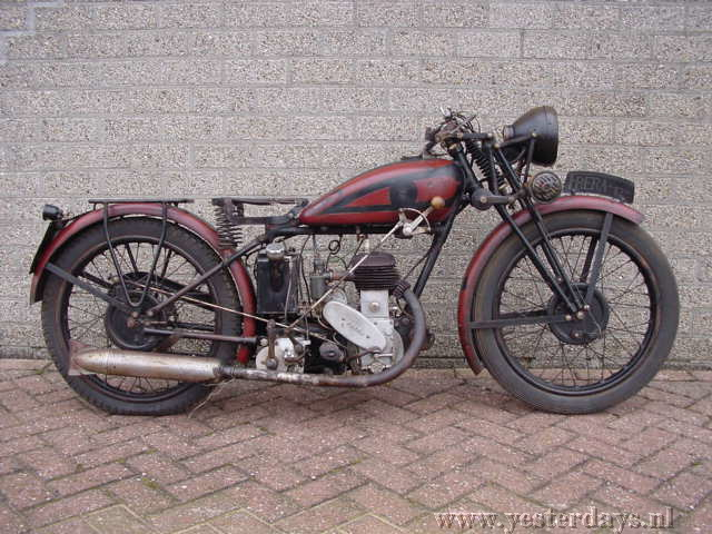 Toestemming van Yesterdays Antique Motorcycles (